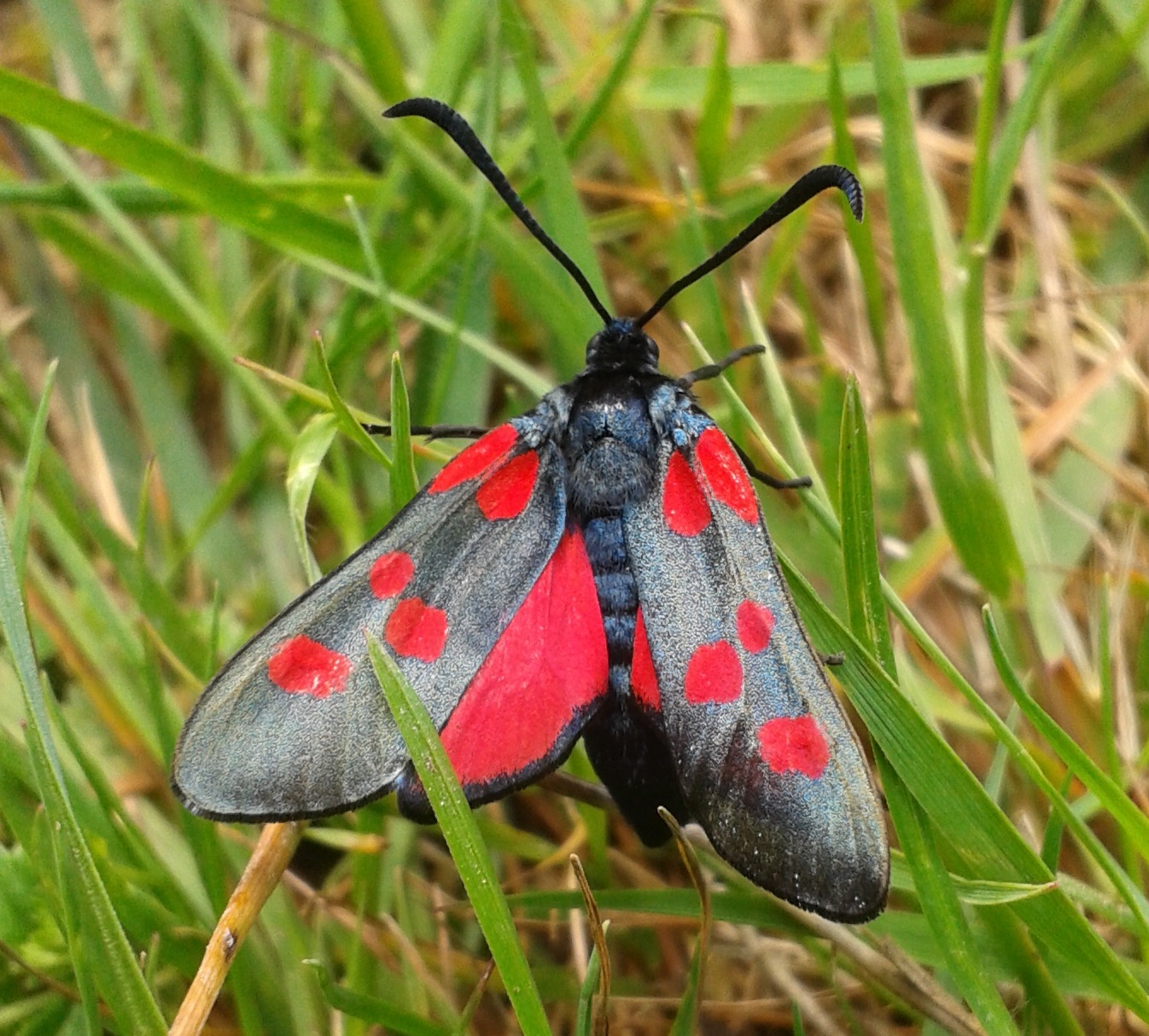 Papillon - Zygène du trèfle - Zygaena trifolii